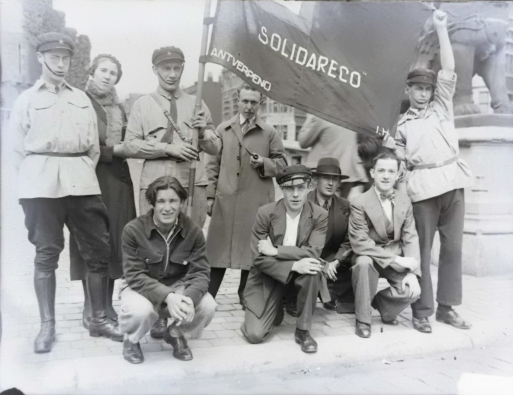 Foto (de vitra negativo) de antverpena Esperanto-grupo Solidareco. Junio 1934, sed eble fiksebla surbaze de vestaĵoj.